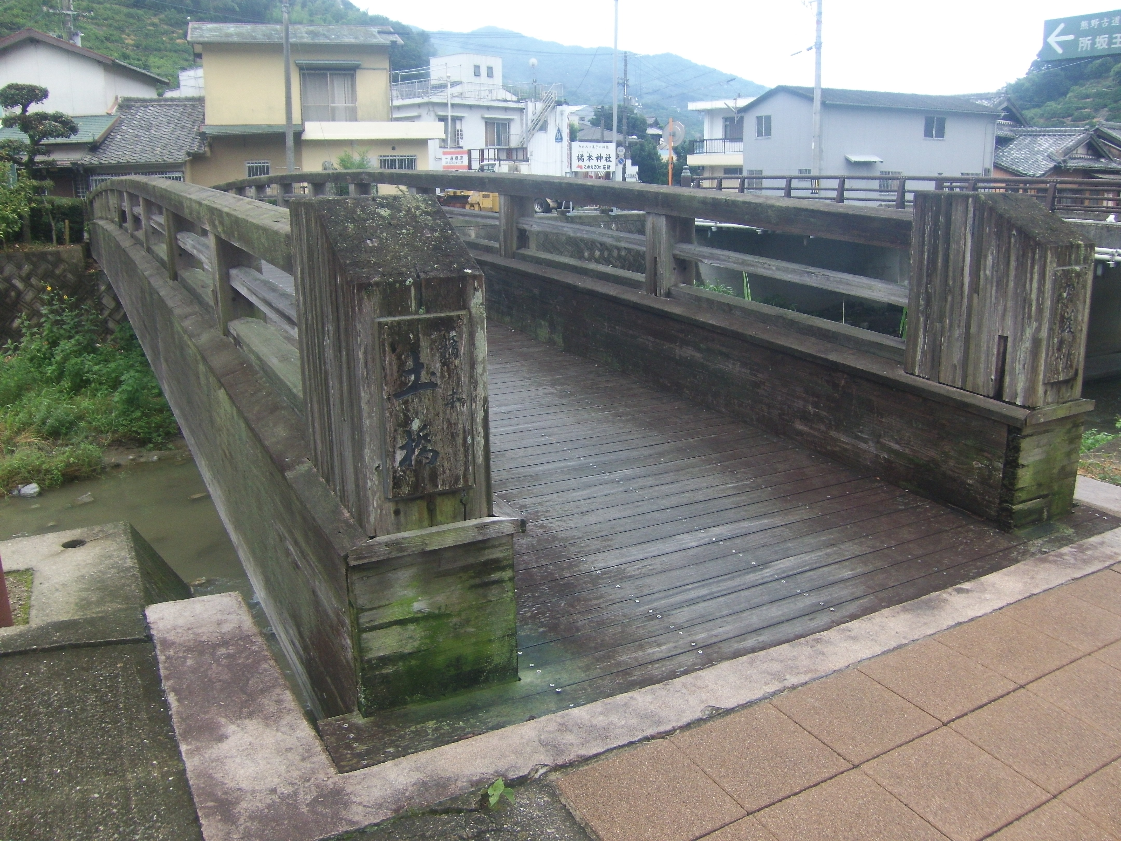 熊野古道・紀伊路に架かる木橋（旧橘本土橋）